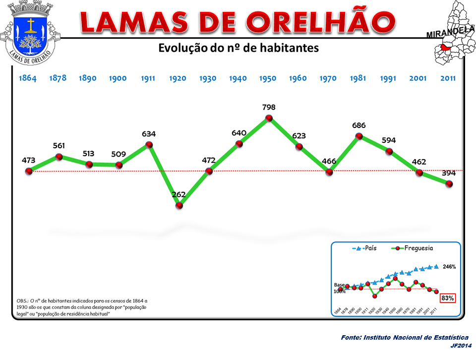 Evolução da População 1864 / 2011